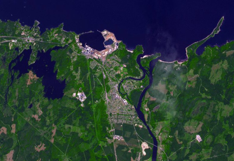 L'embouchure du Dalälven et la ville suédoise de Skutskar (on voit surtout la grande zone portuaire). Photo du 28 juillet 2008.